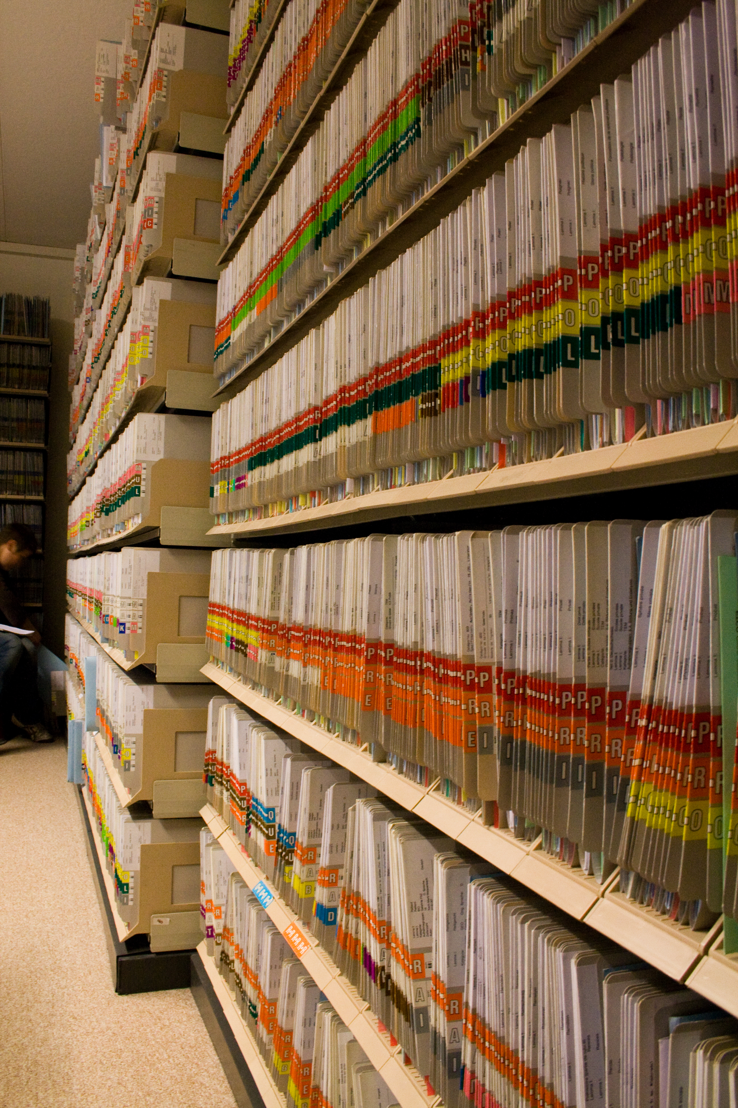 Rédaction du Dictionnaire historique de la Suisse à Berne